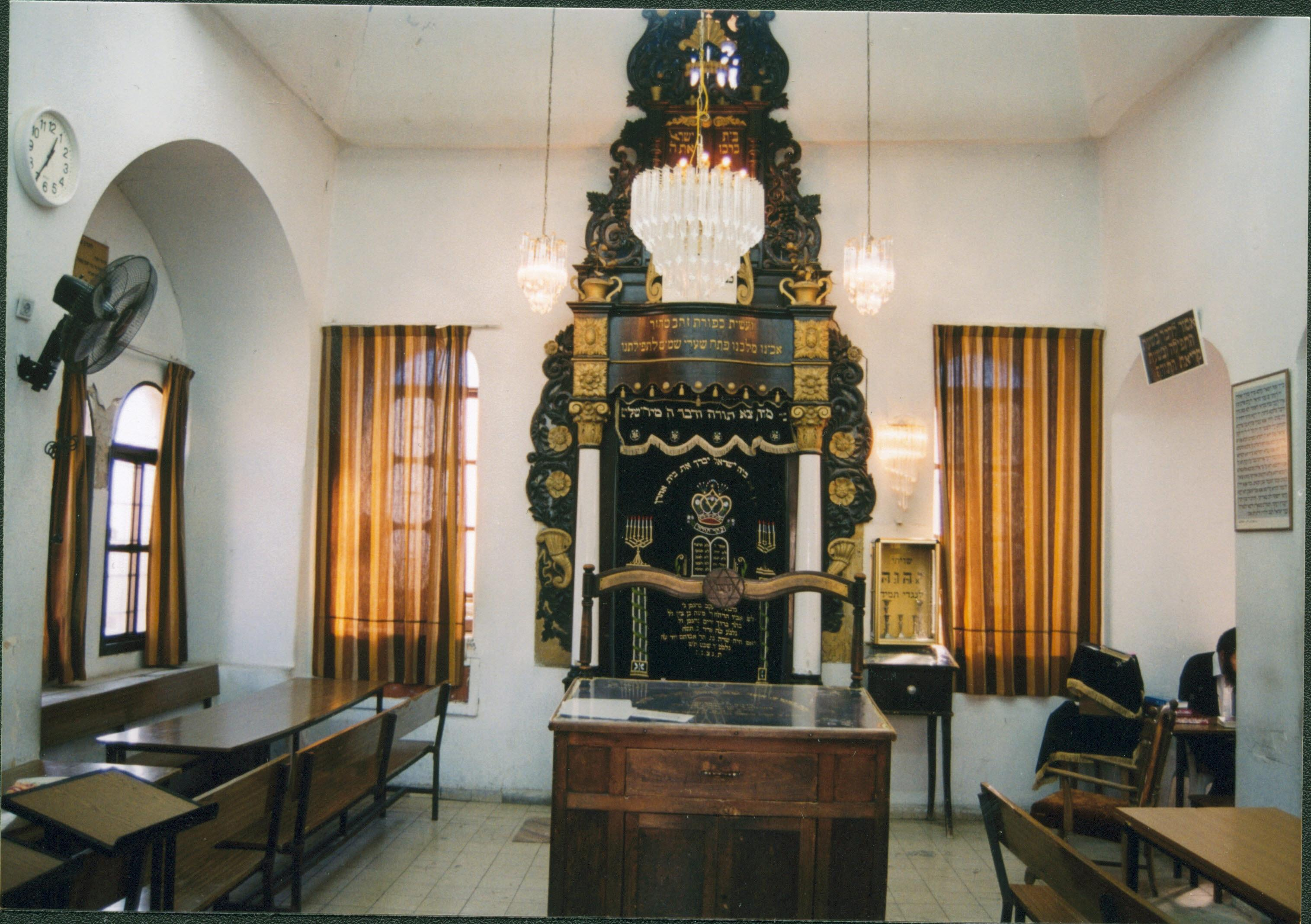 פנים בית הכנסת של ראשוני החסידים בטבריה